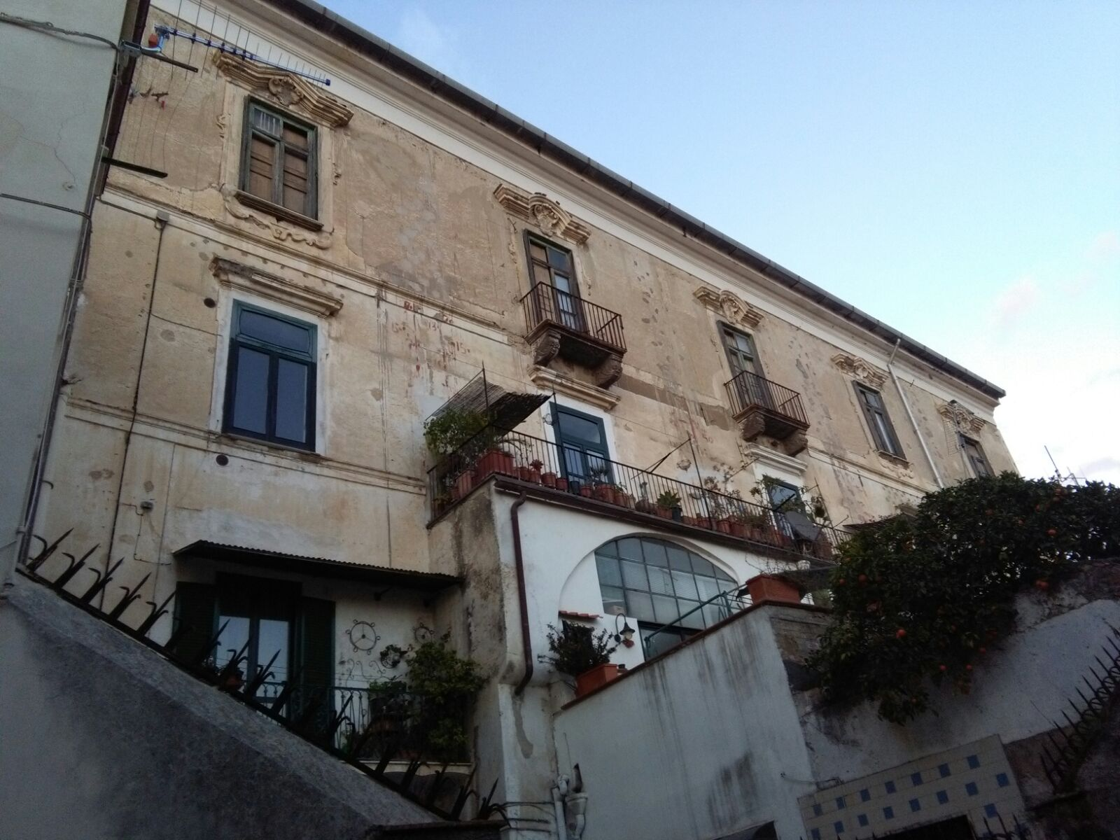 Facciata di Palazzo San Massimo di Salerno, ex sede del Liceo Artistico Andrea Sabatini. Vista da via de Ruggiero Trotula.